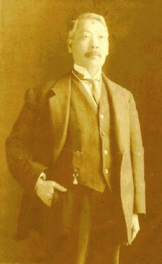 欧阳庚，1927年获二等嘉禾奖